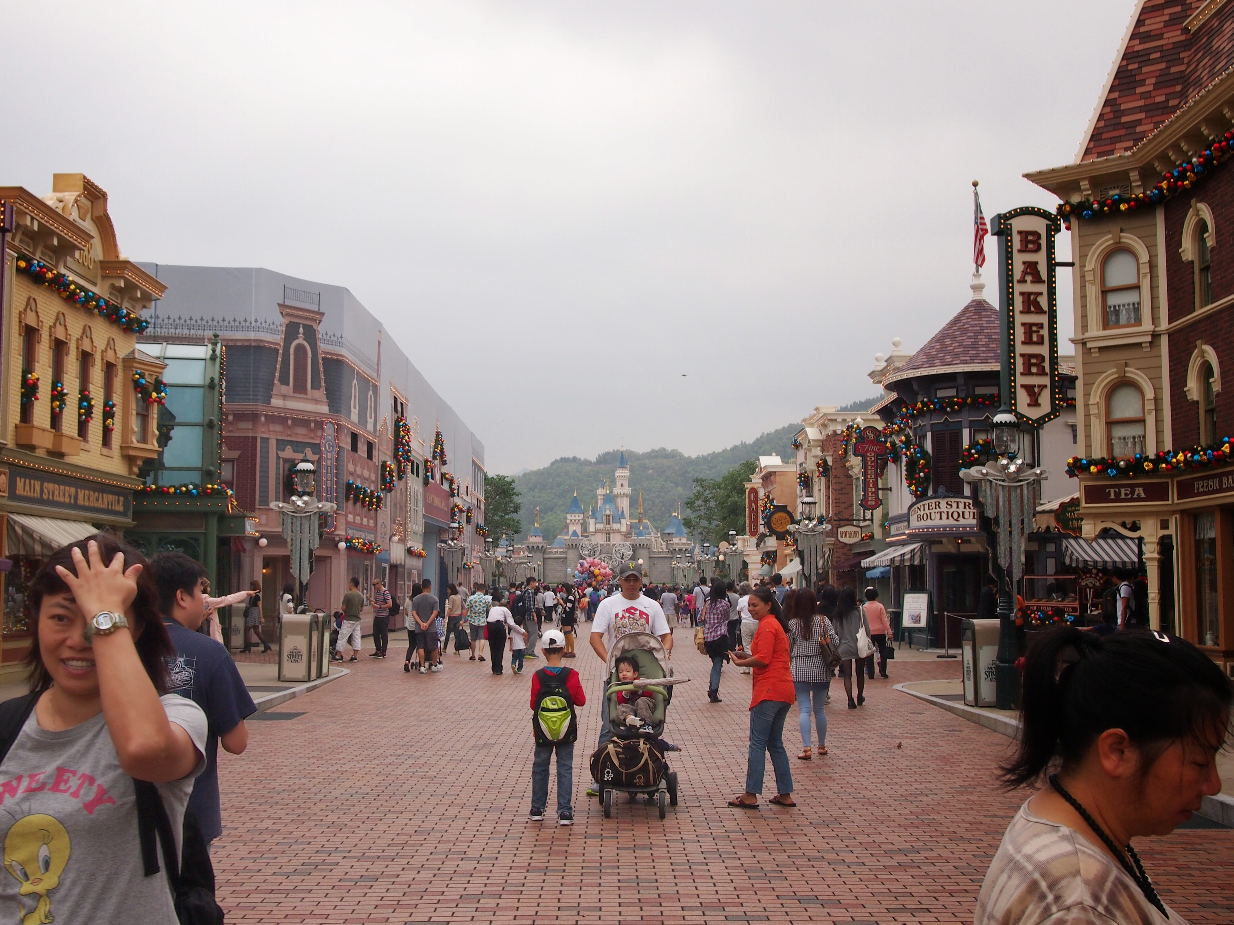 Диснейленд Гонконг главная улица